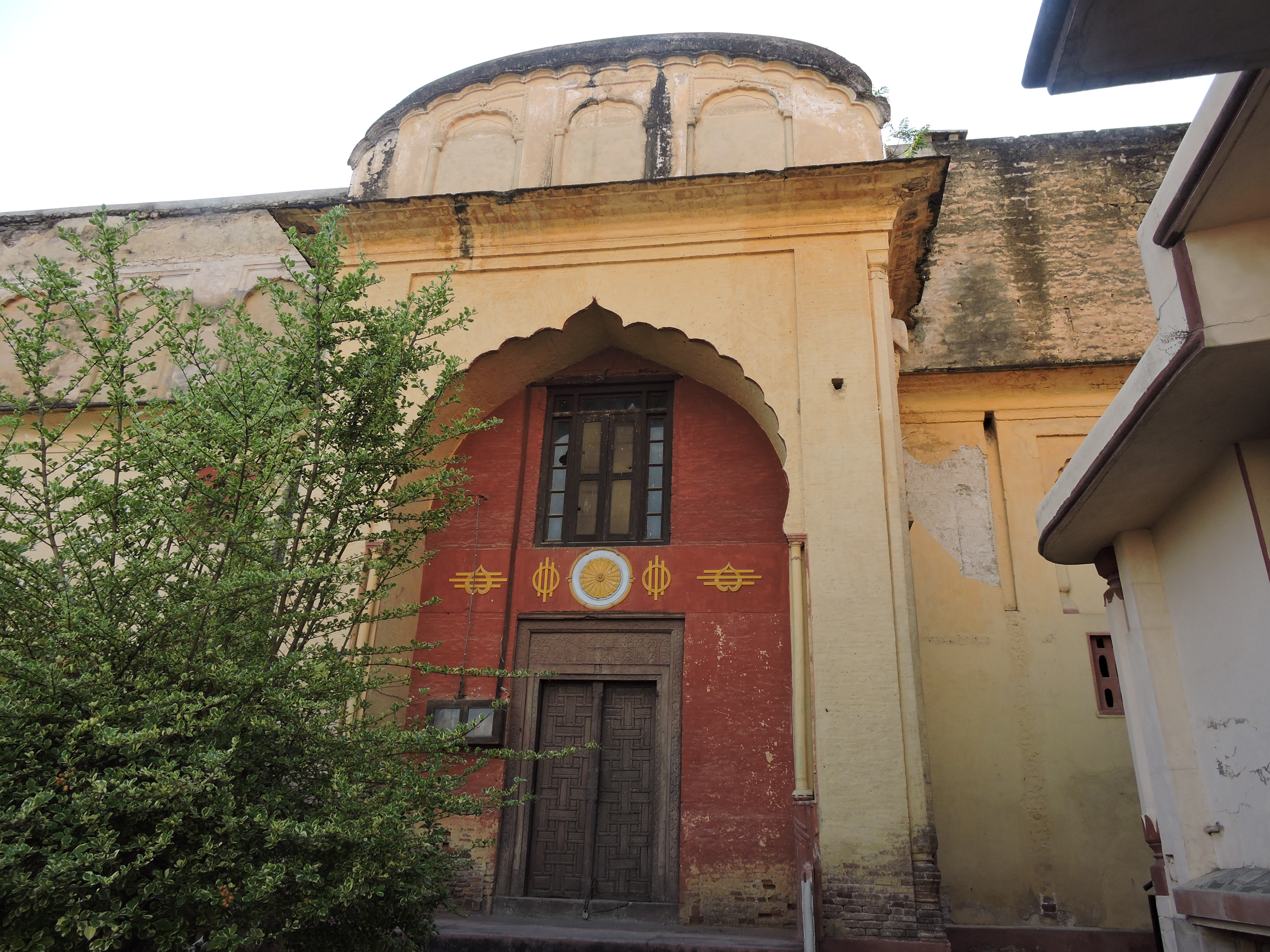 ਪੰਜਾਬੀ: ਅਰਕੀ ਦੇ ਕਿਲੇ ਦਾ ਉਹ ਹਿੱਸਾ ਜੋ ਅਜਕਲ ਕੁੰਵਰ ਨਗਿੰਦਰ ਸਿੰਘ ਦੀ ਨਿਜੀ ਰਿਹਾਇਸ਼ ਹੈ ।